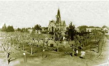 Plaza Bartolomé Mitre y Parroquia Inmaculada Concepción de Monte Grande